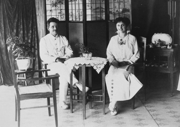 Foto. Portret van een Europees stel voor een kamerscherm in hun huis op de onderneming Bandar Negri